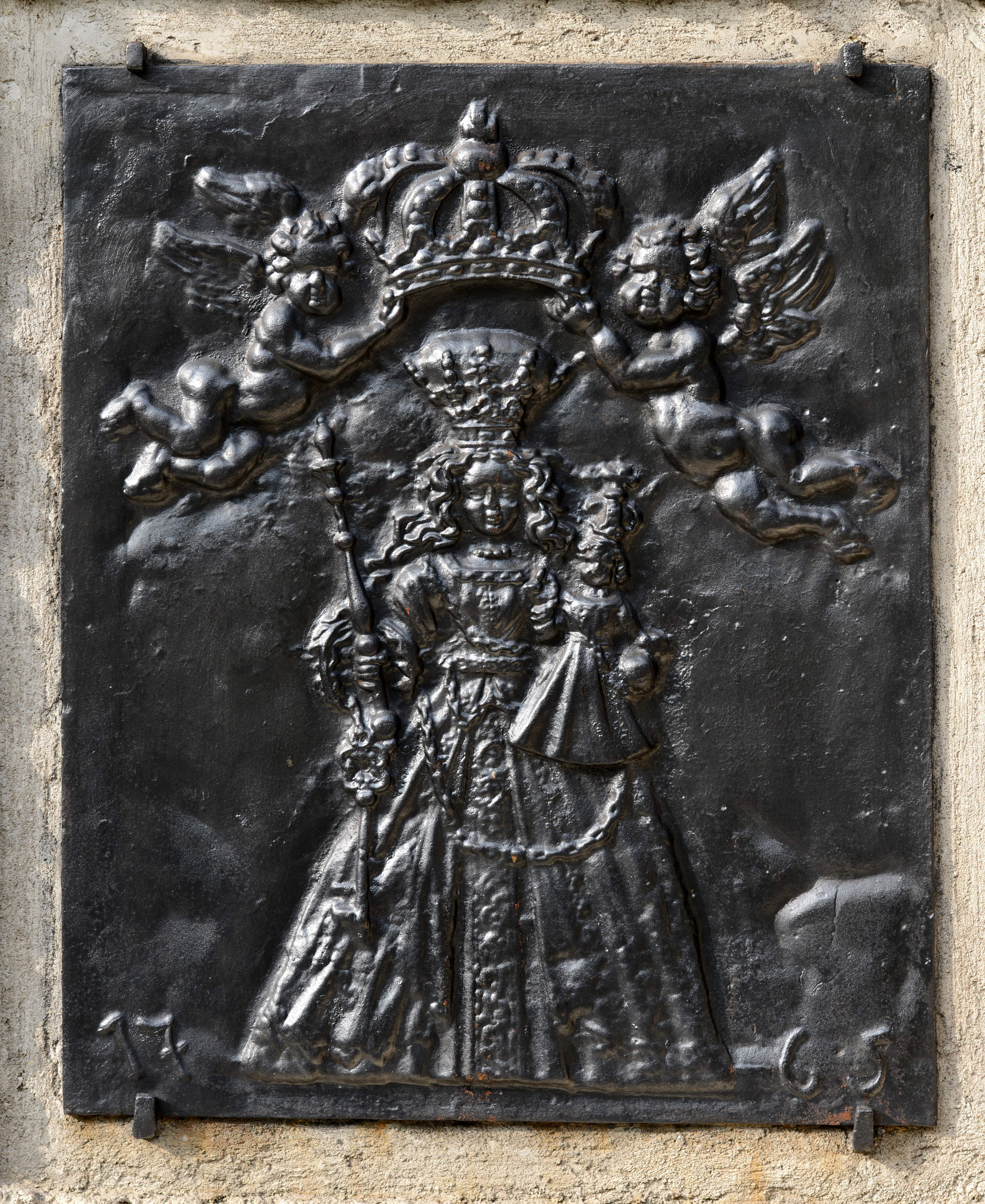 D'Consolatrix Afflictorum op enger Tak zu Méchela.